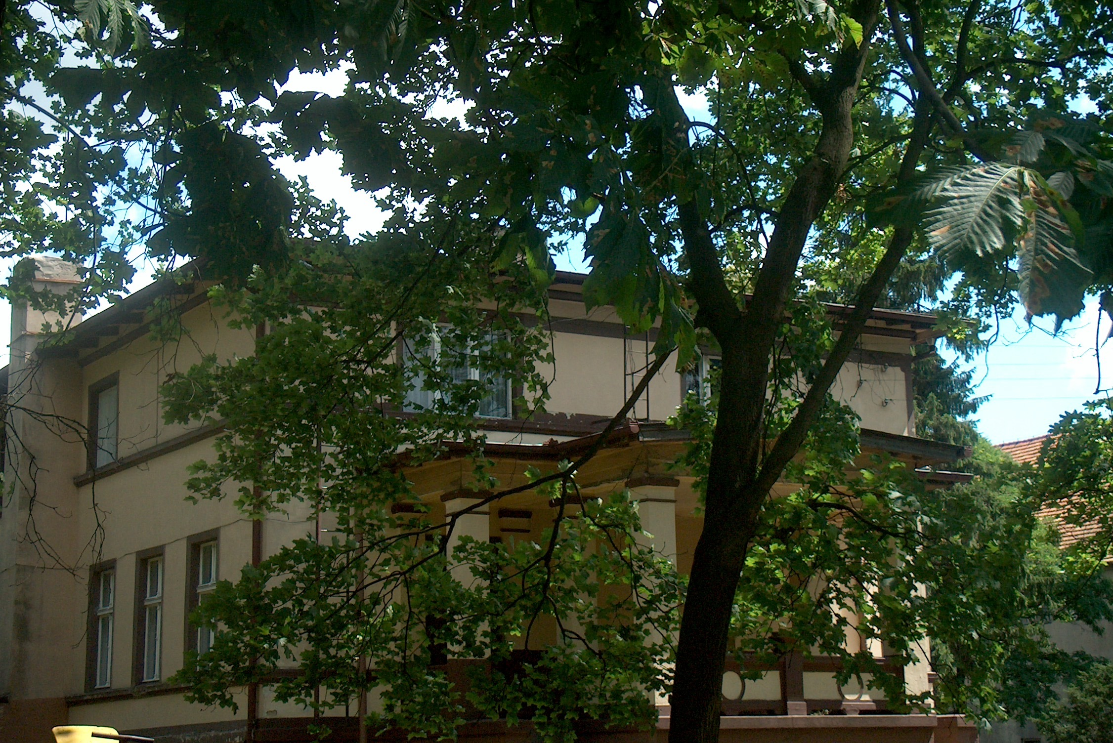 Barchlin - zespół dworski: dwór z 1893 r. (zabytek nr 1567 A)